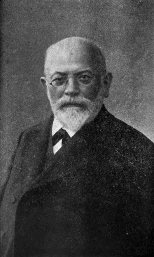 Hornjoserbsce: Jan Bohuwěr Pjech (1838–1913); serbski knihikupc, přełožowar, publicist, słowjanski prócowar a spěchowar němsko-słowjanskeje wzajomnosće.